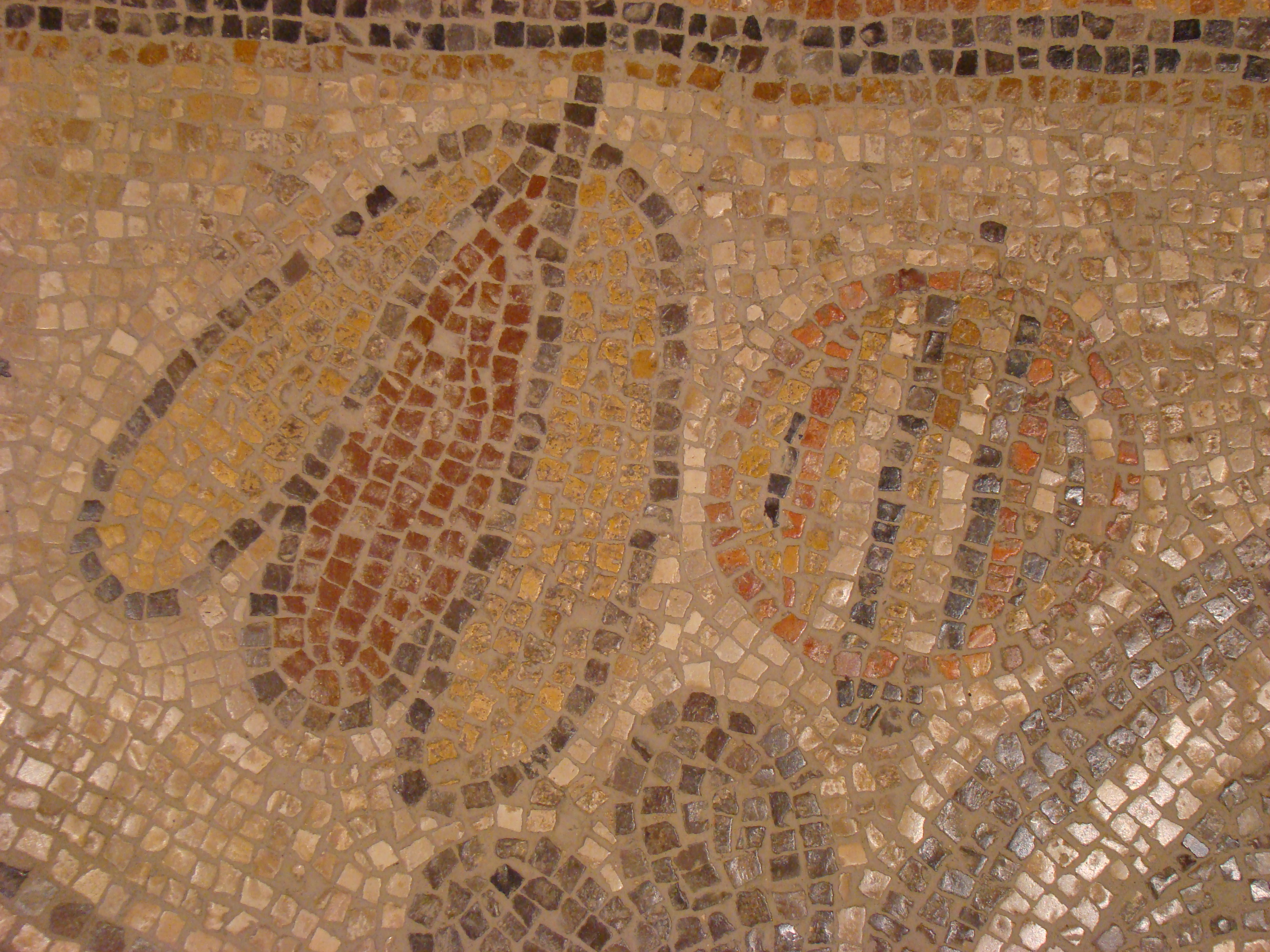 פסיפס בית הכנסת בית אלפא